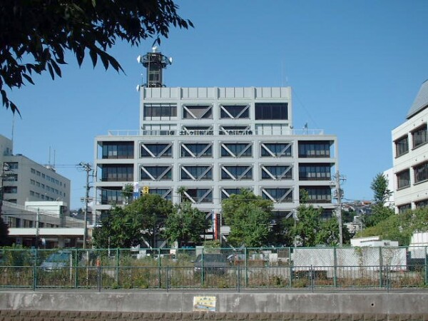 Hodogaya-ku Ward Office, Hodogaya-ku, Yokohama, Kanagawa, Japan (保土谷区役所)